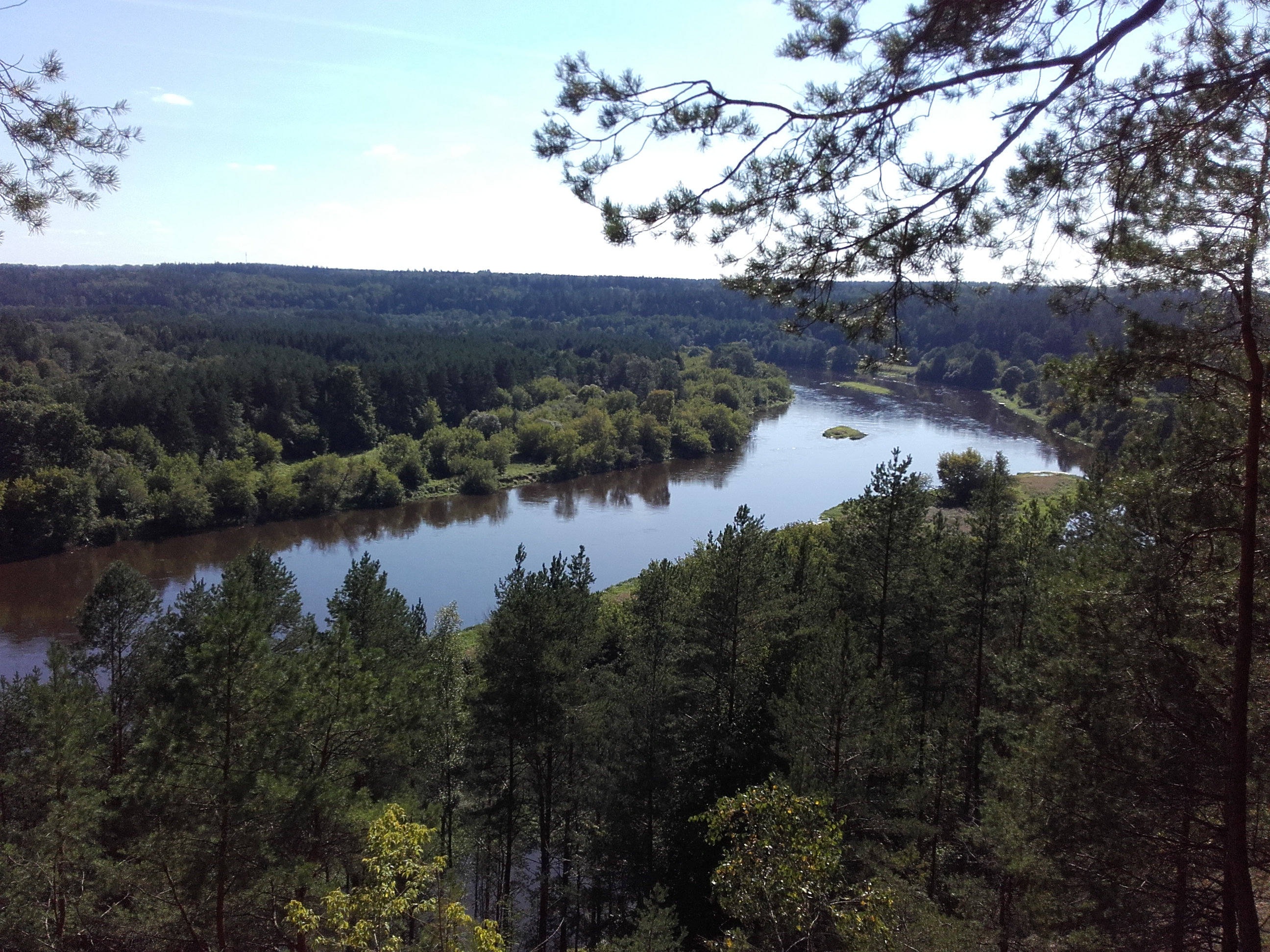 Paneriškių regykla - vienas iš TOP 3 regioninio parko panoramų!